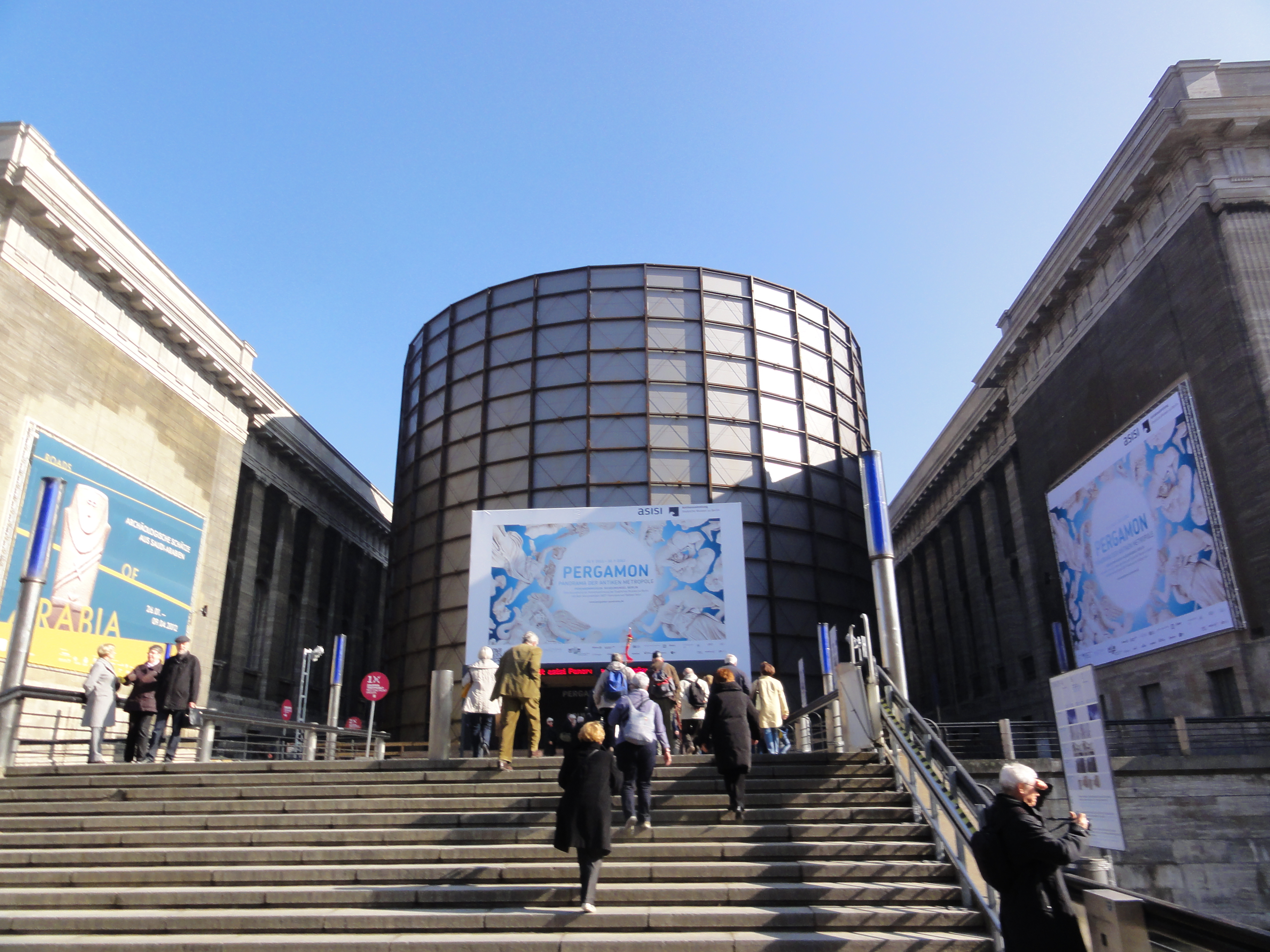 Pergamonmuseum